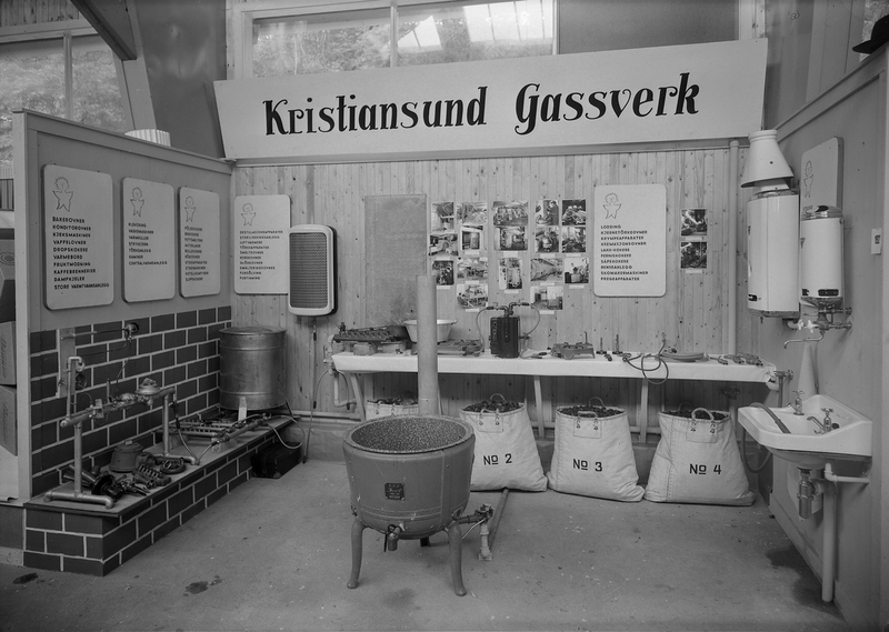 Nordmørsutstillinga i Kristiansund 1950. Kristiansund Gassverks utstilling av utstyr for bruk i husholdningene.